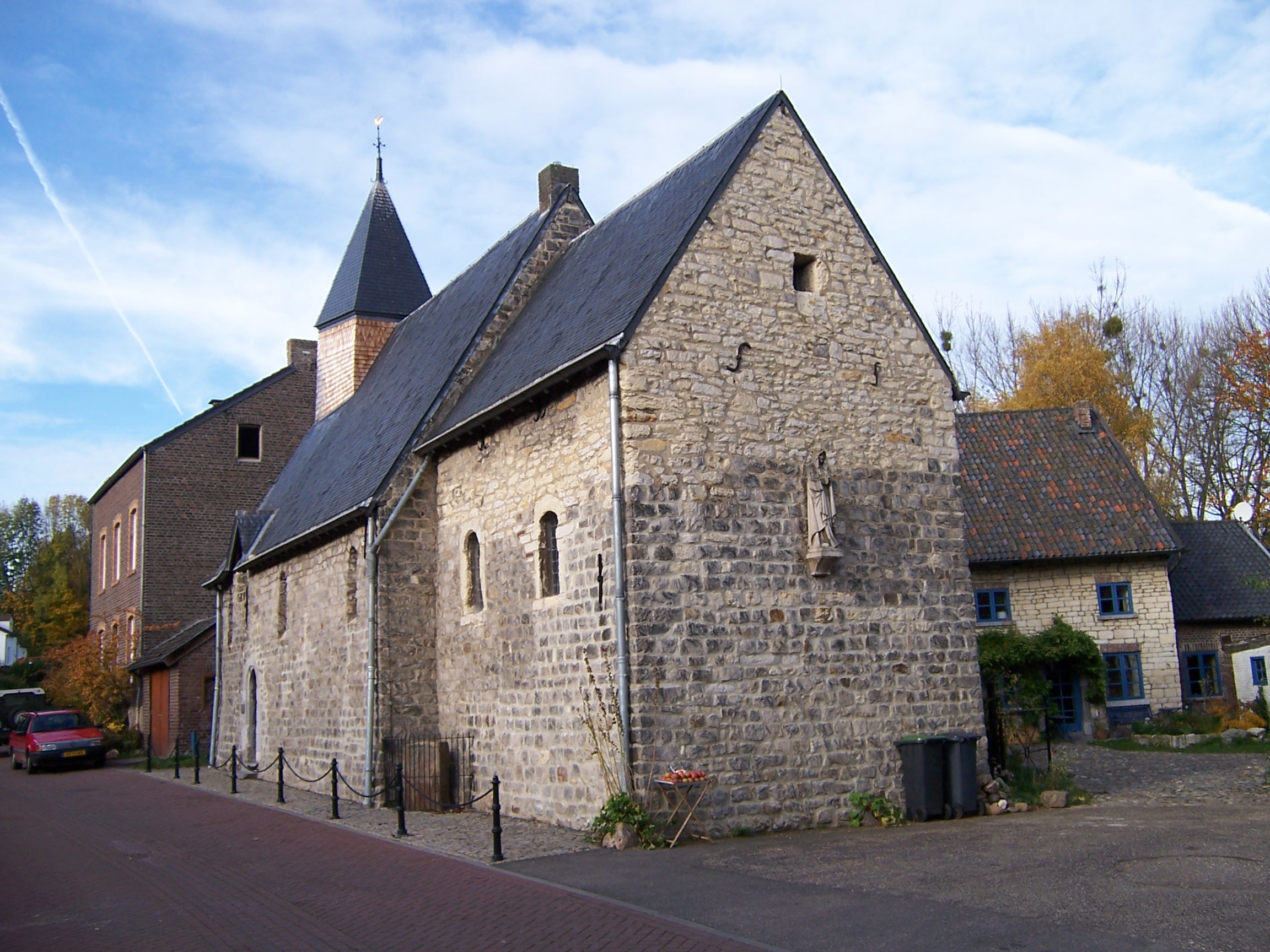 eigen foto kapel van Lemiers